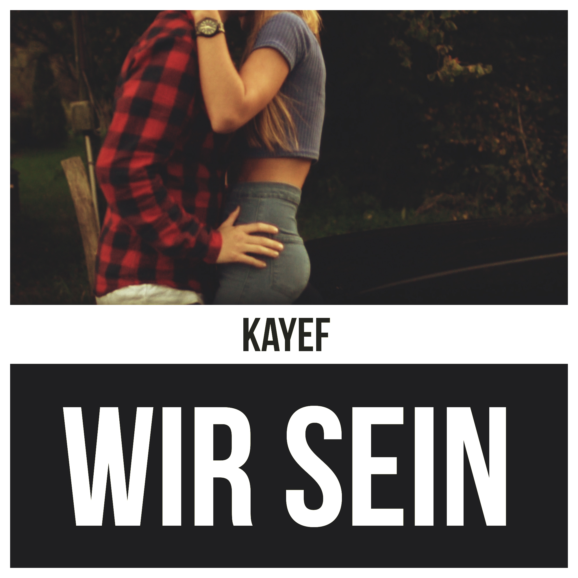 Cover der Single „Wir sein“